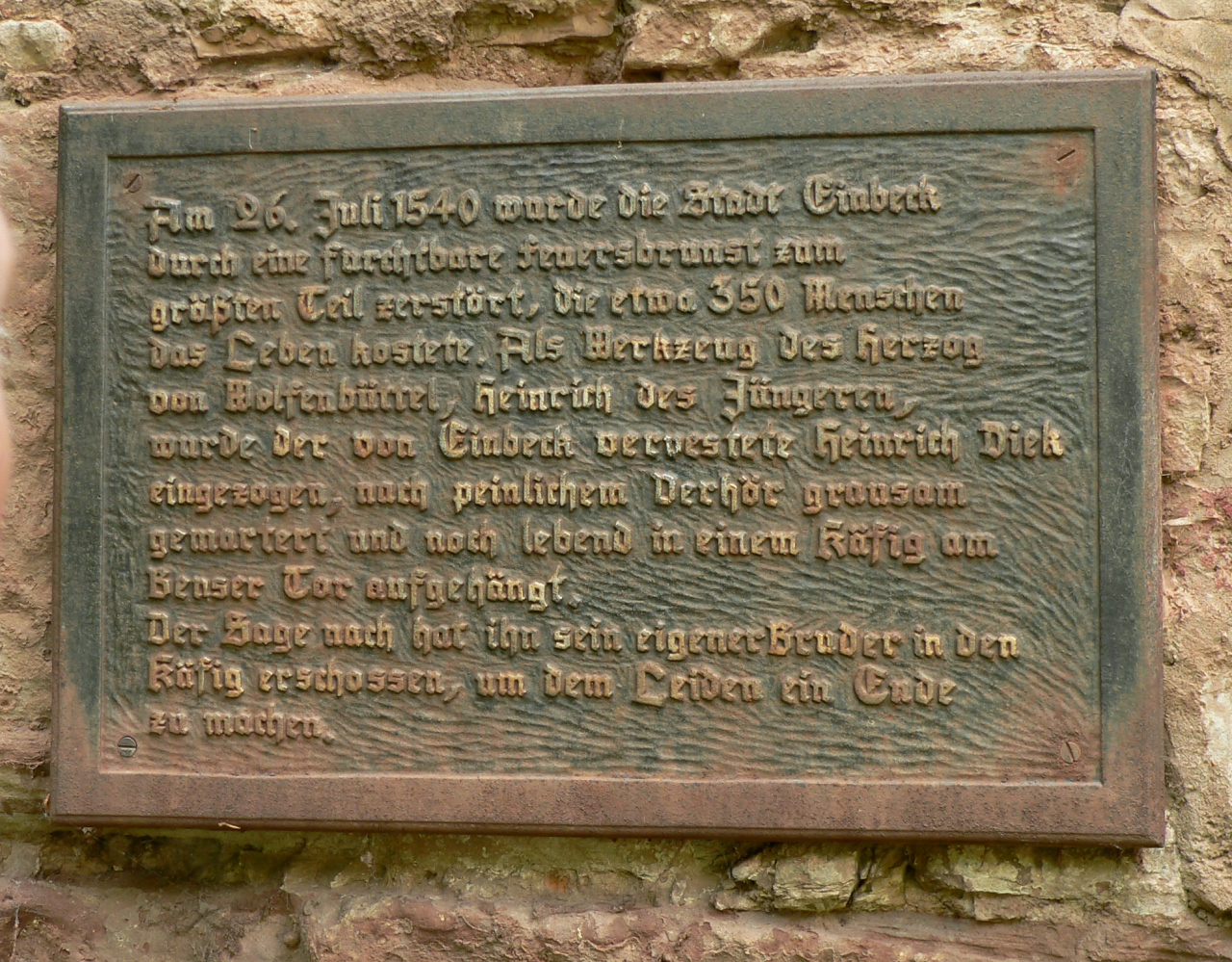 Gedenktafel am Diekturm